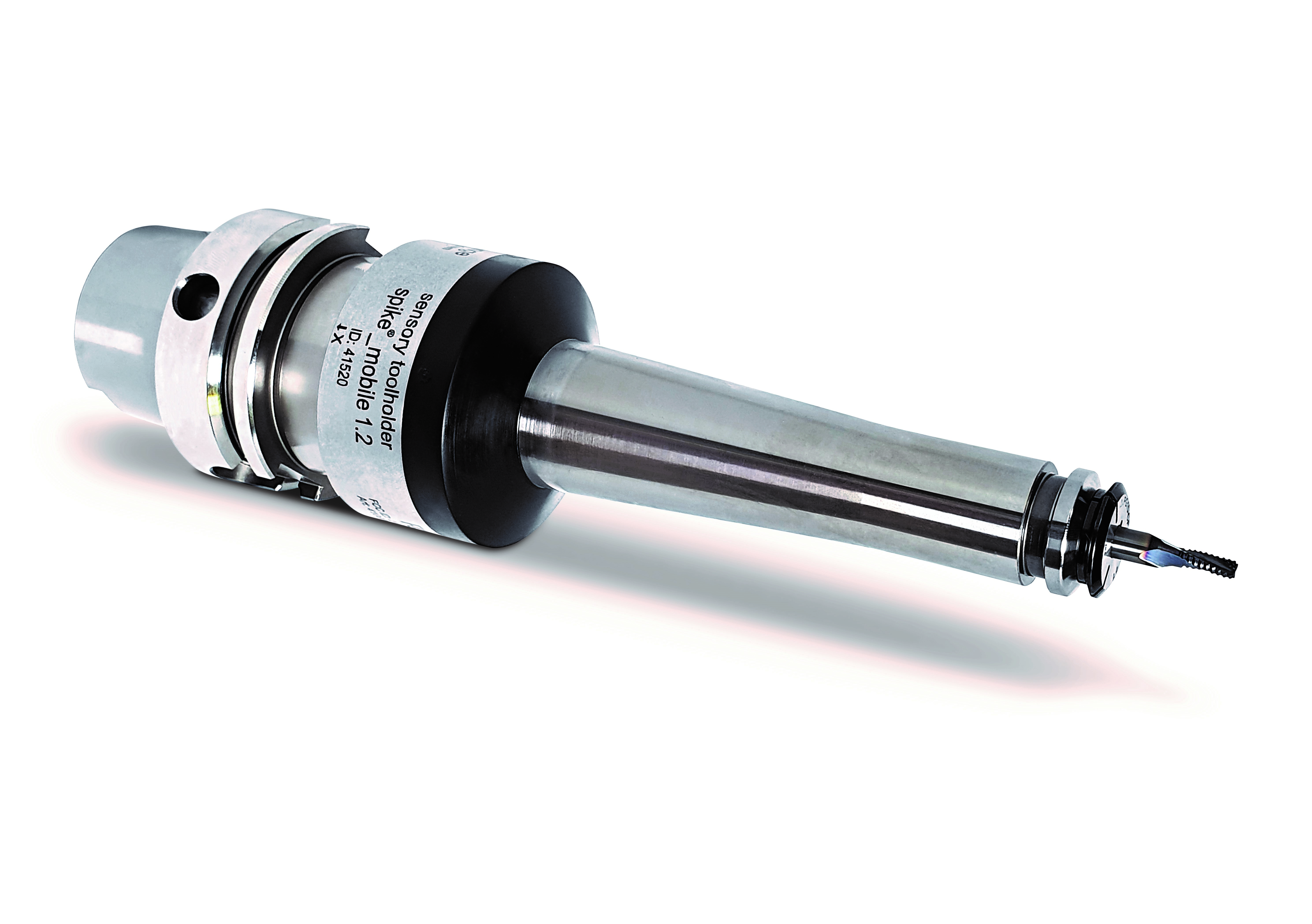 sensorischer Werkzeughalter, welcher mit Dehnungsmessstreifen ausgestattet ist